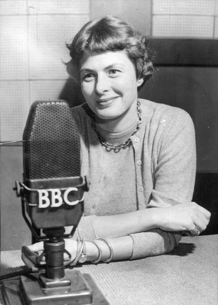 Måndagsradions aktuella porträtt resulterade i en lyckad bild, där modellen, Ingrid Bergman, själv starkt bidrog till framgången. Så öppenhjärtigt som här har hon aldrig tidigare talat om sig själv och problemet stjärnan–privatmänniskan. Vad hon sade lämnar naturligtvis plats för invändningar, men det utmynnade i en vädjan om förståelse för att även en "person som står i rampljuset" och vet att hon behöver reklamen också ibland kan vilja vara... [resten oläsligt]